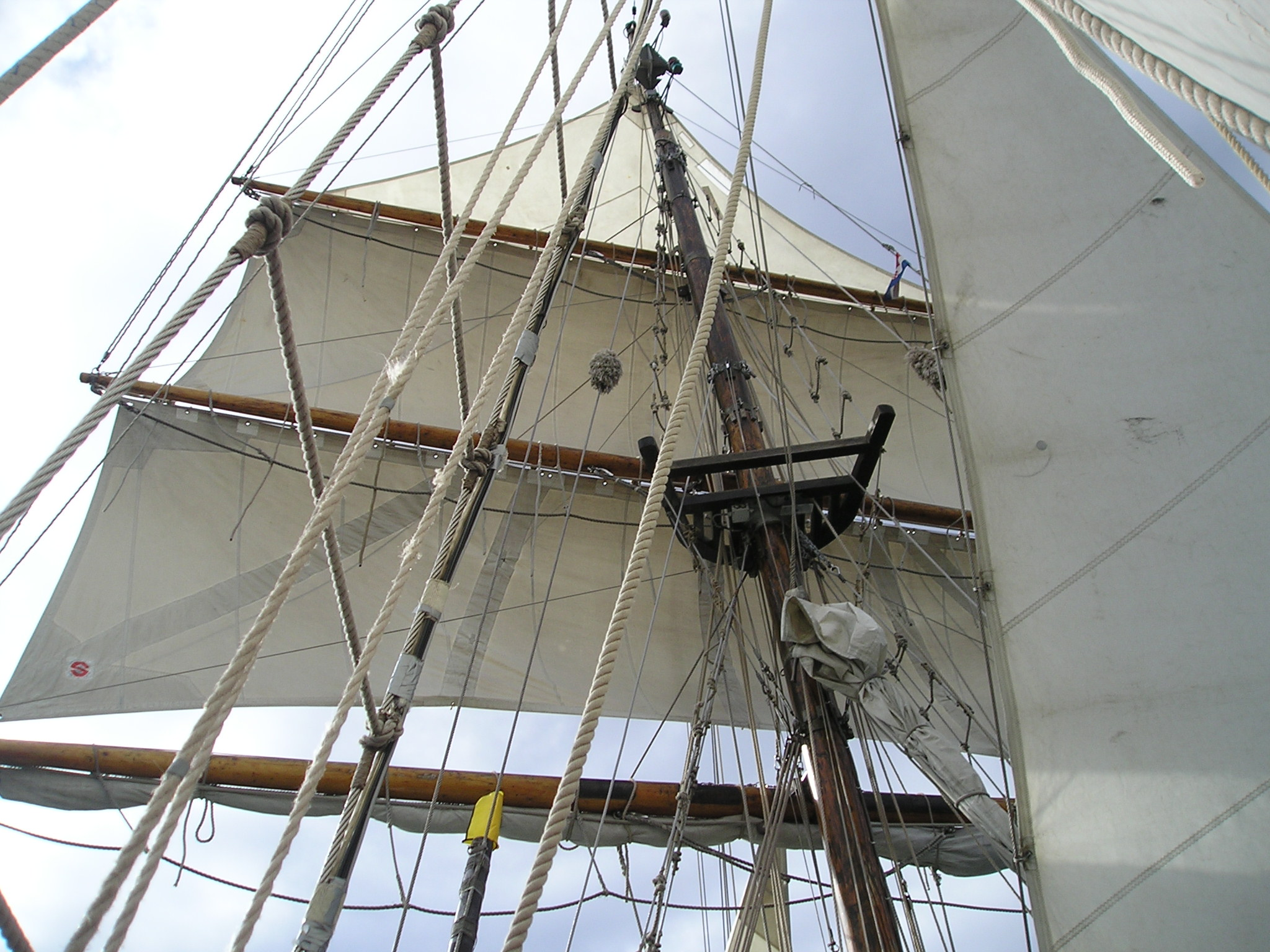 Die Rahen einer Brigantine von Unten: Fockrah, Untermarsrah, Obermarsrah - der frei gesetzte Flieger.